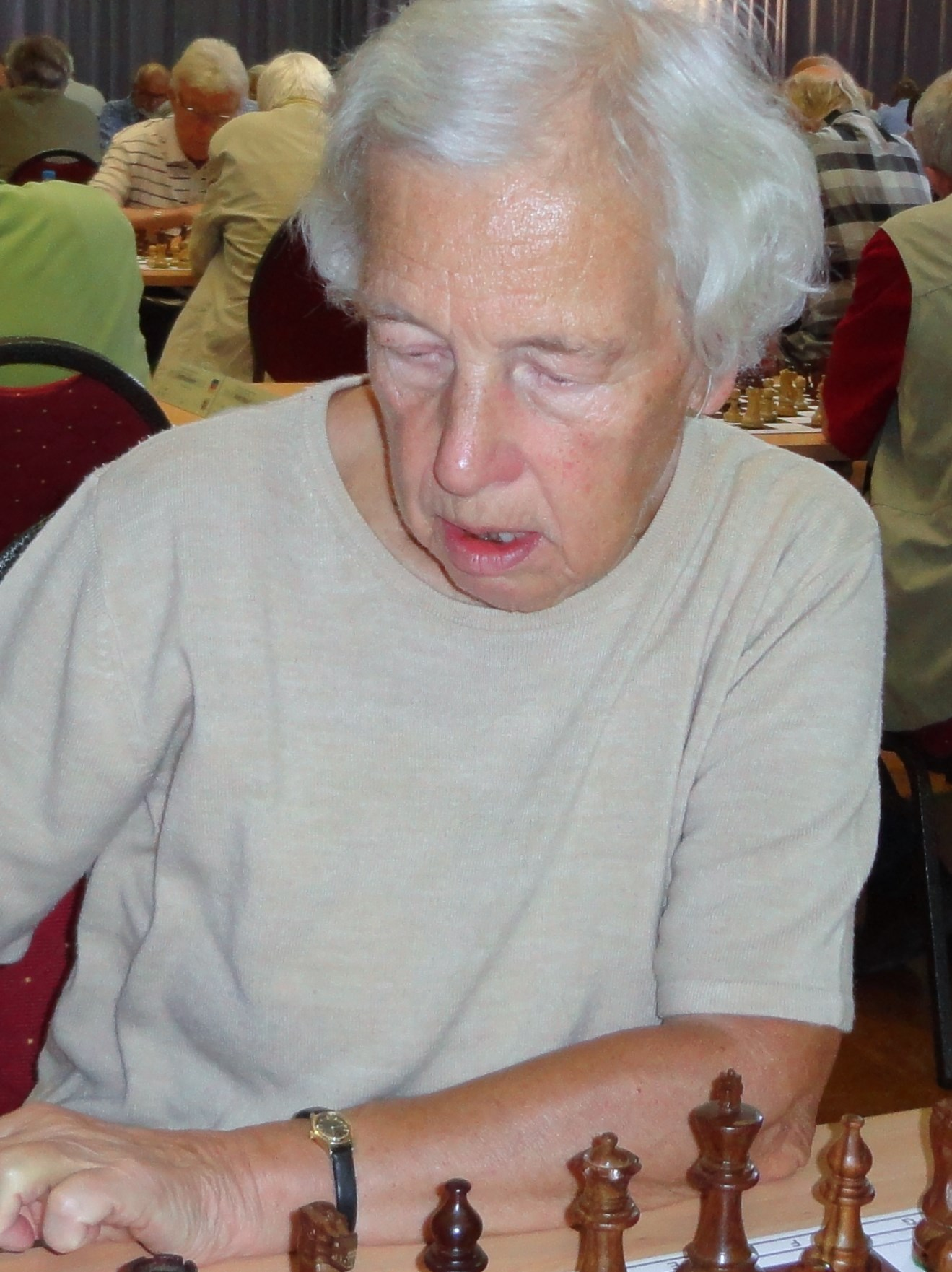 Dr. Gabriele Just, Deutsche Schachmeisterschaft der Senioren 2013 in Oberhof (Thüringen).